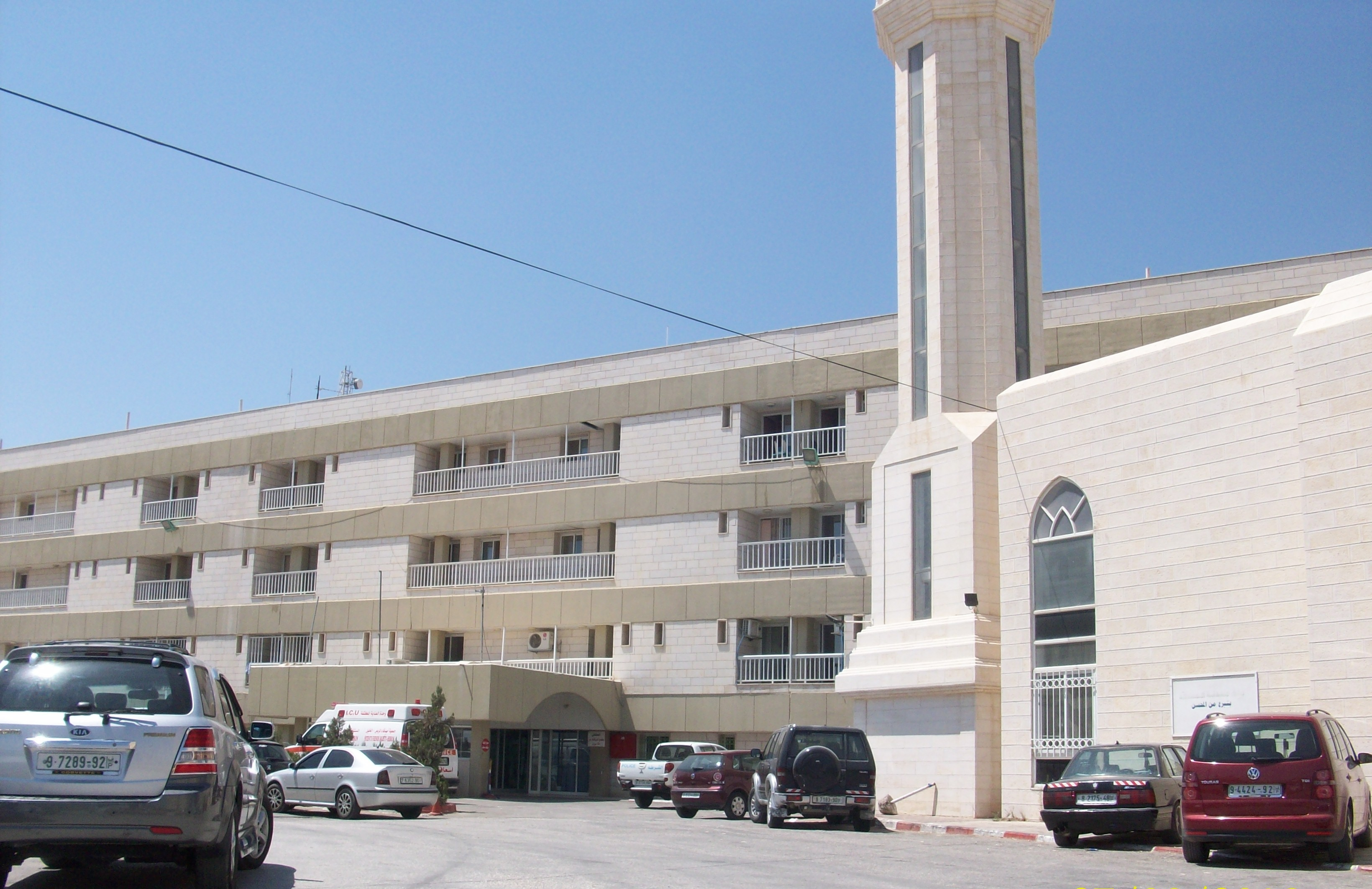 مبنى المستشفى الأهلي في مدينة الخليل